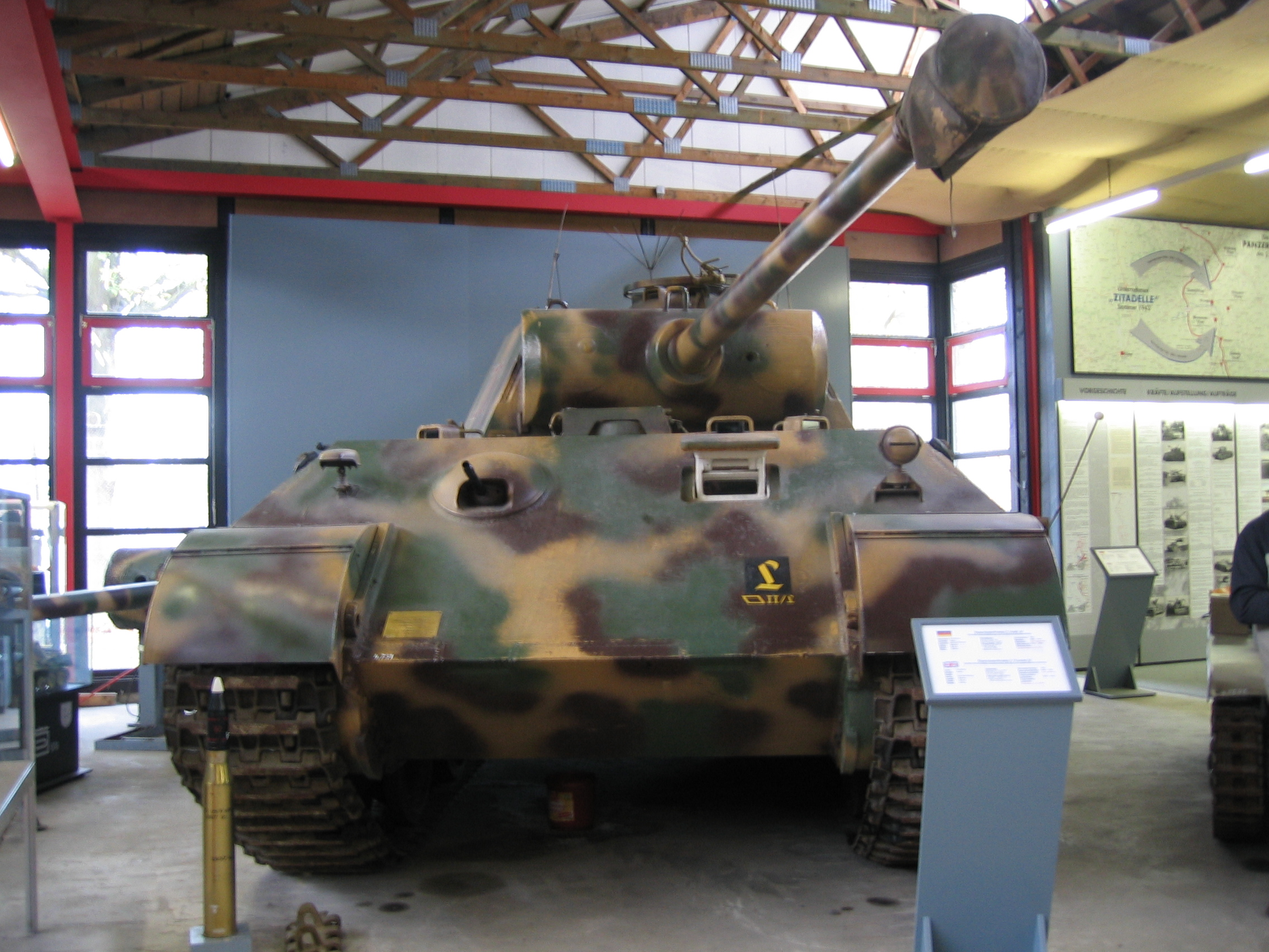 Panzerkampfwagen V Panther